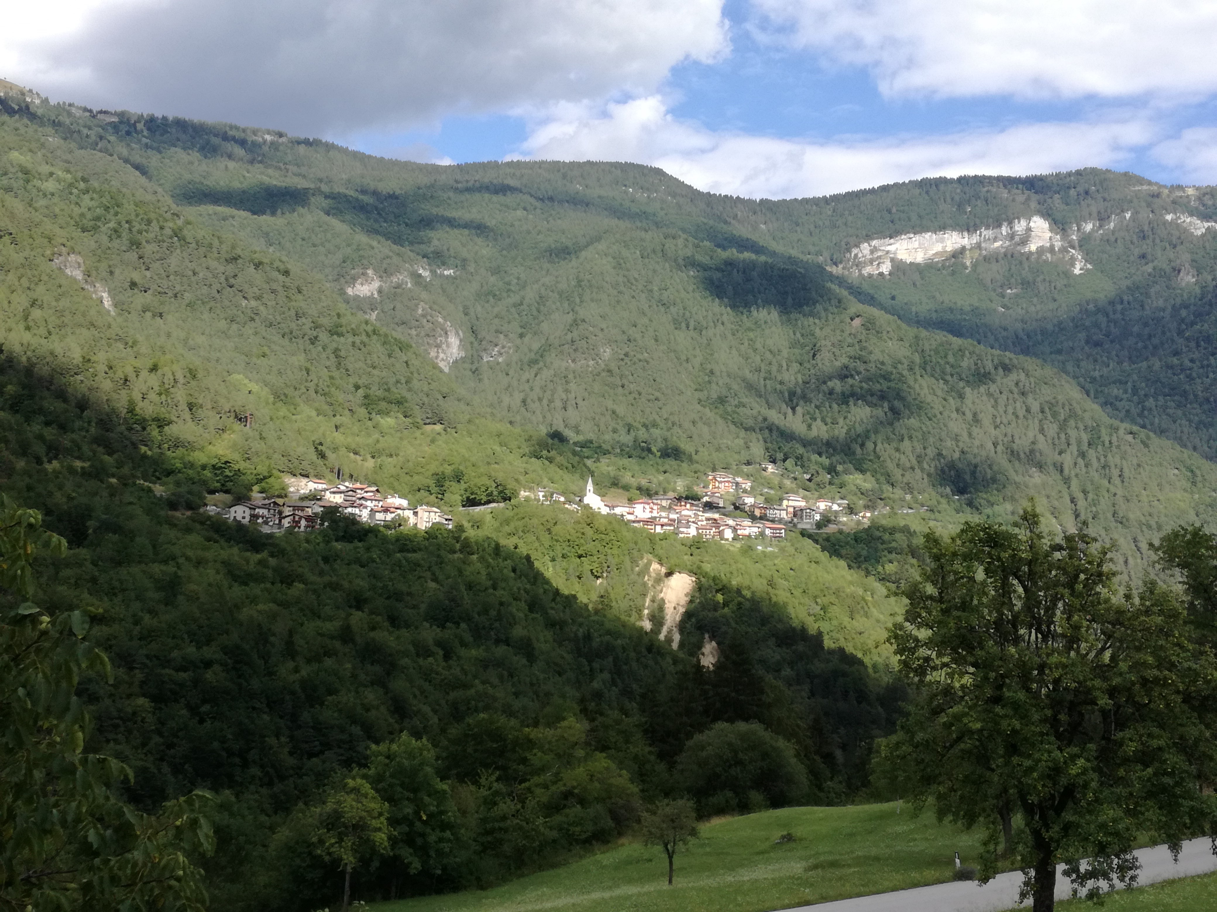 Oberes Val Terragnolo mit den Orten Baisi, Zoreri, Soldati, Campi und Incapo